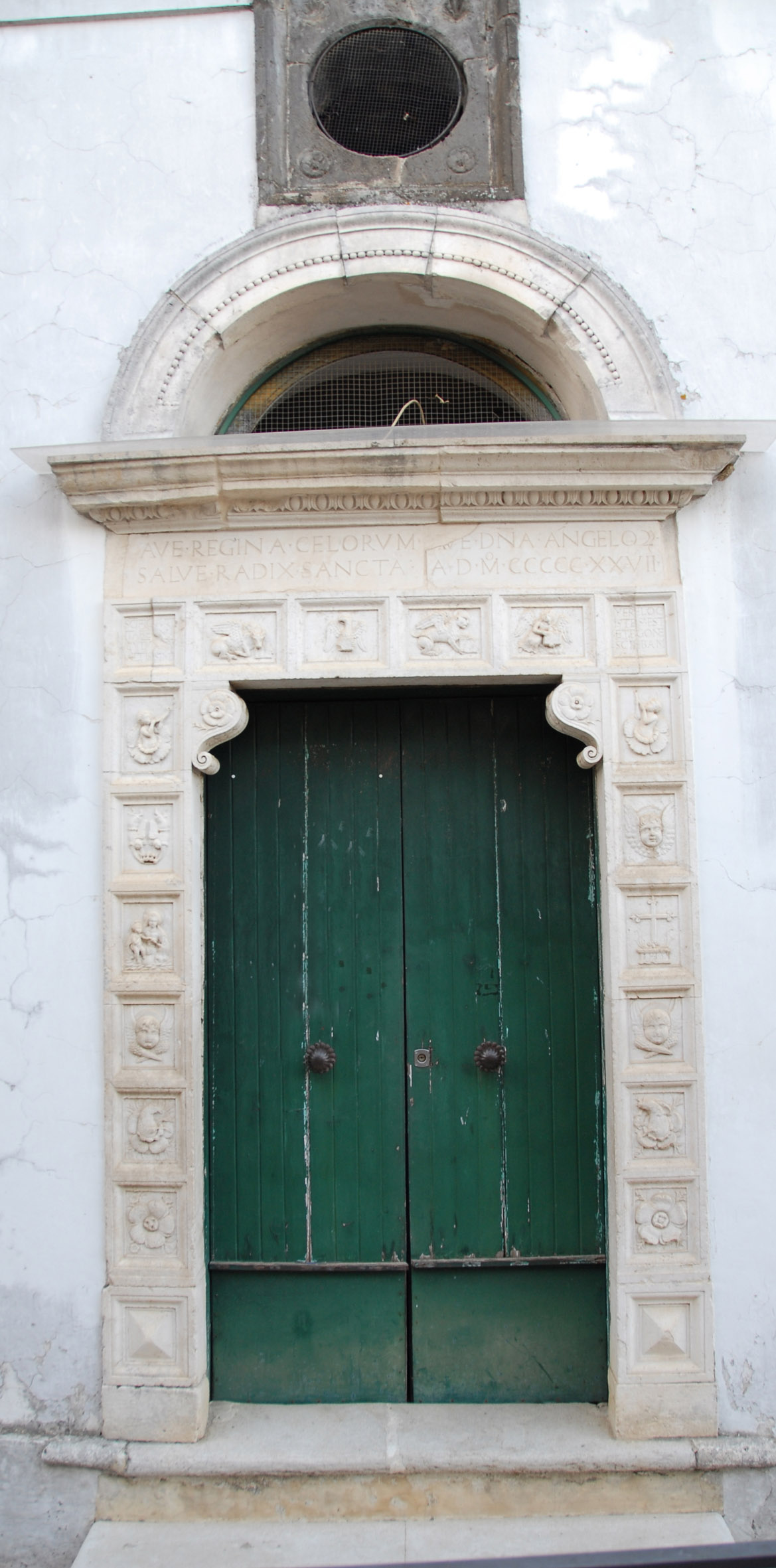 == Licenza d'uso: ==